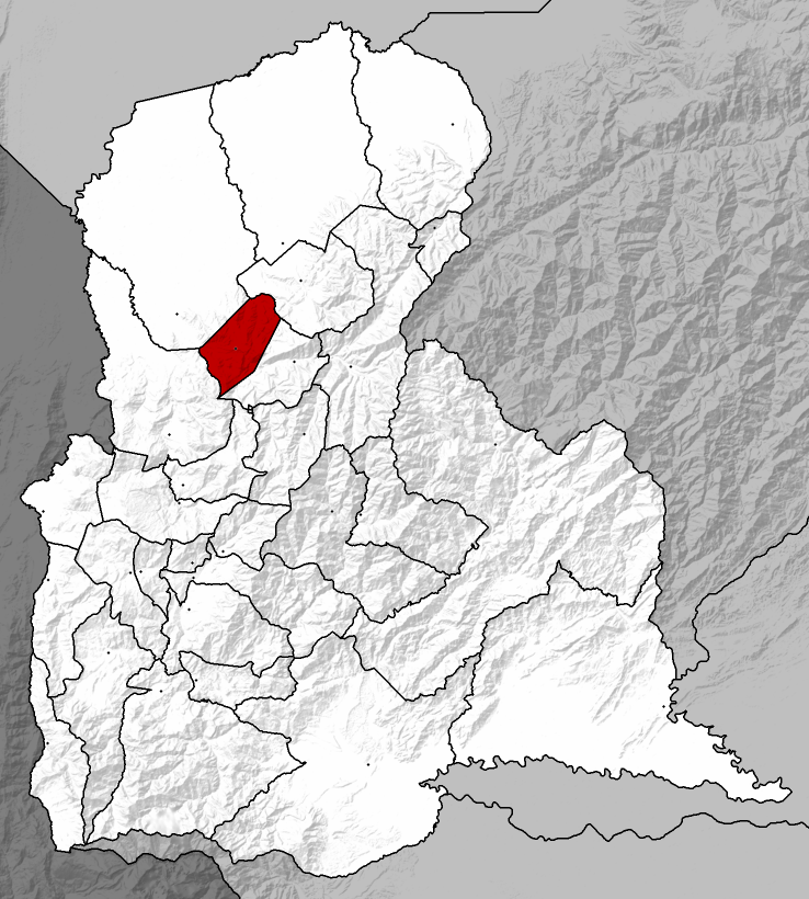 Mapa localizador con relieve del municipio Antonio Romulo Costa del estado Táchira